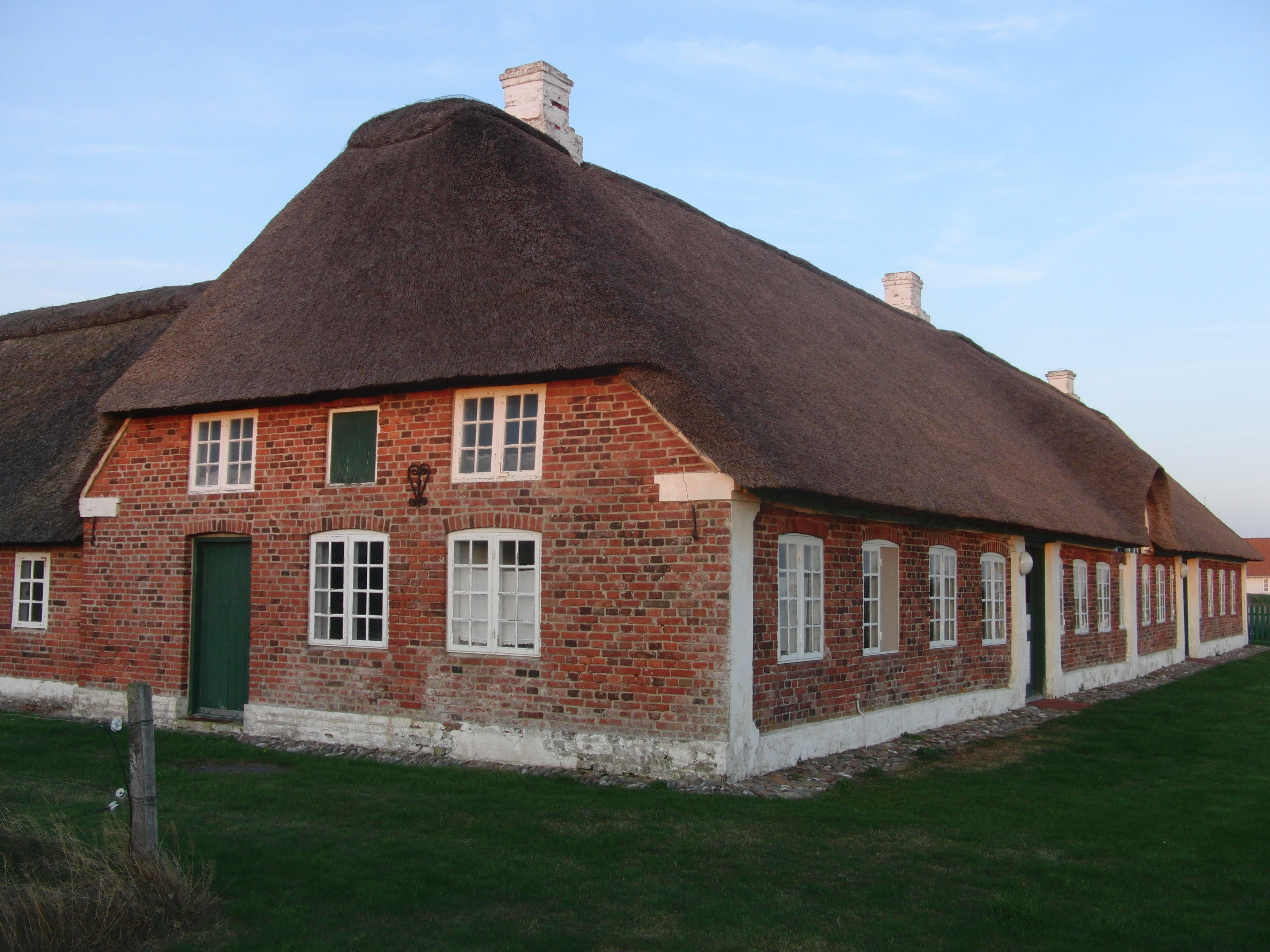 Abelines Gaard in Nørre Havrvig in Hvide Sande ist die ehemalige Strandvogtei / Hof des Strandhauptmannes. Erbaut zwischen 1854 und 1871. Heute Teil des Ringkøbing-Skjern Museums